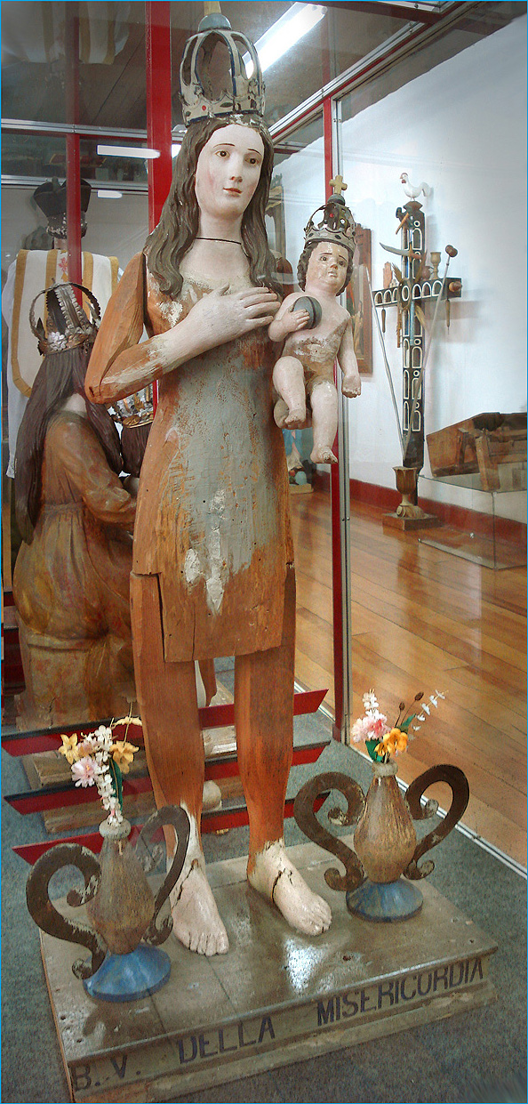 Virgem da Misericórdia, imagem de roca do século XIX no Museu Municipal de Caxias do Sul, Brasil.